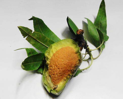 костилката на ядката